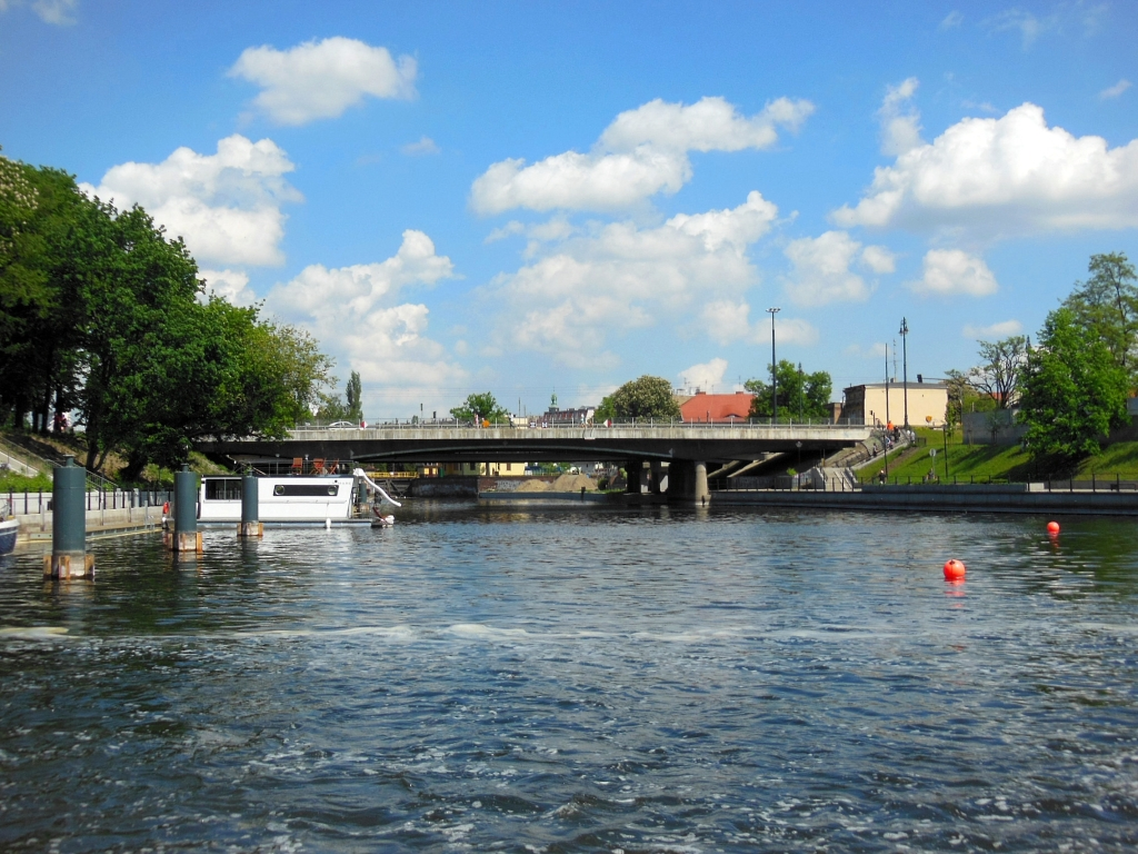 Mosty Solidarności w Bydgoszczy